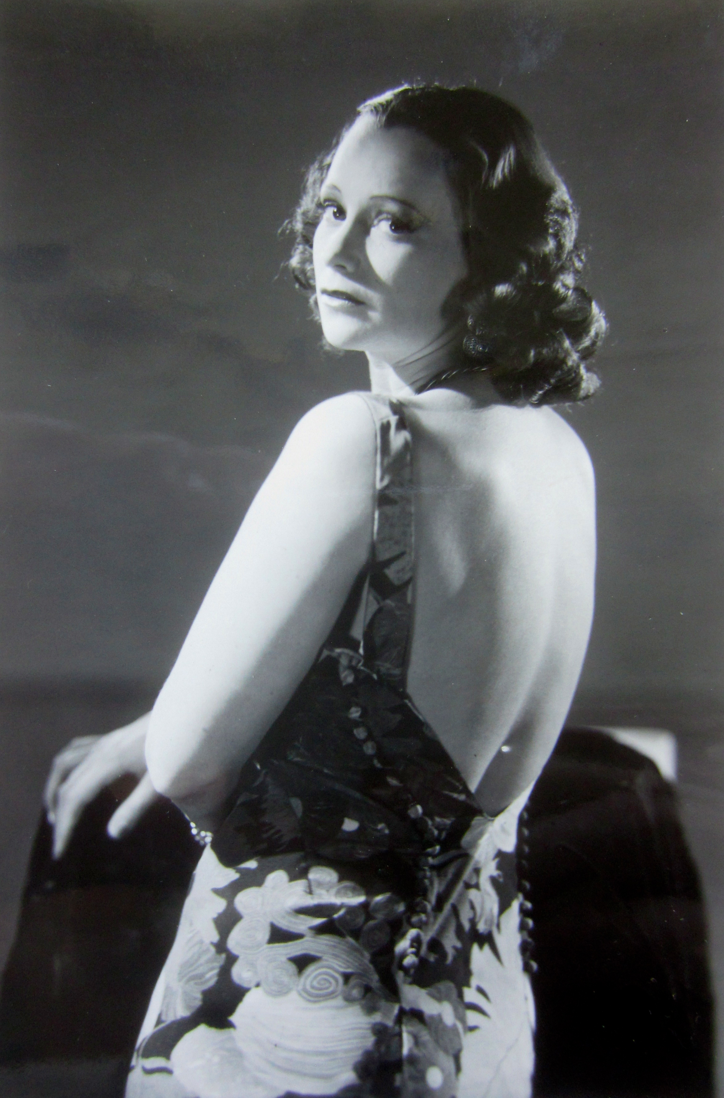 Lill-Tollie Zellman 1908-89, svensk skådespelare